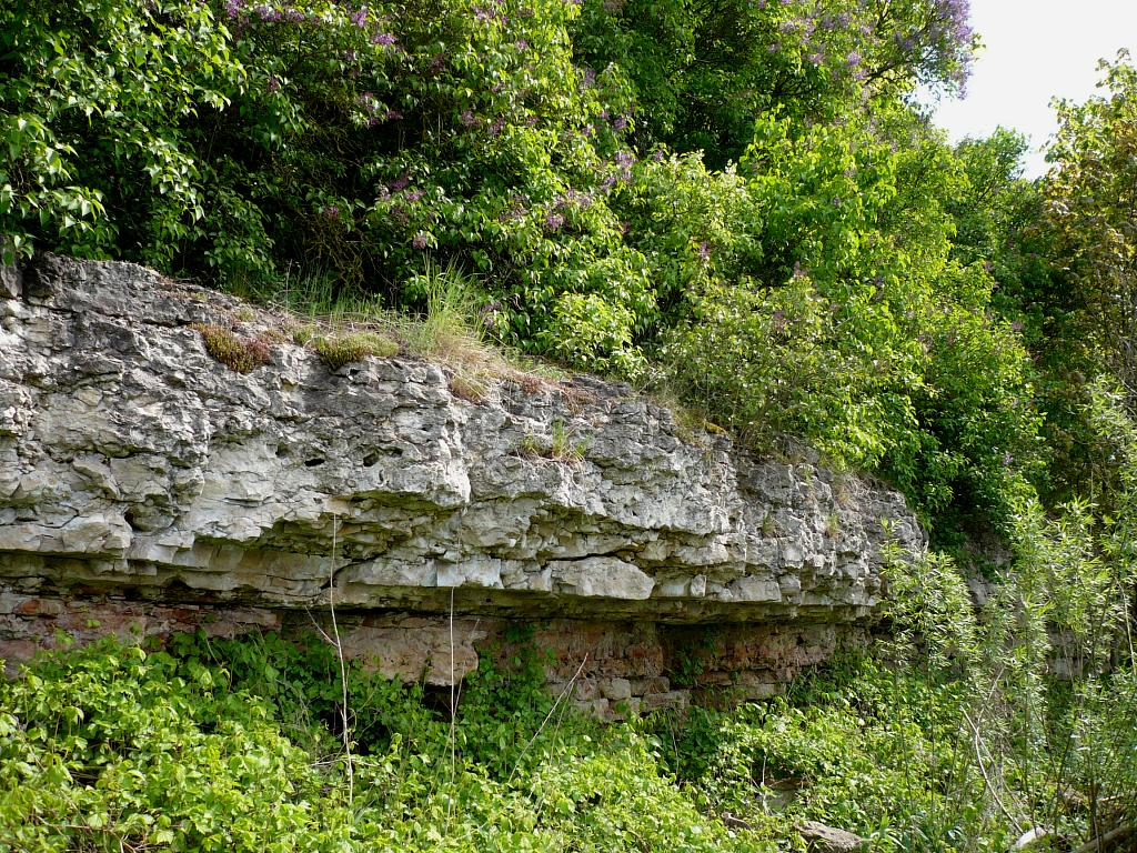 Dolesmuižas dolomīta atsegums 2008-05-11